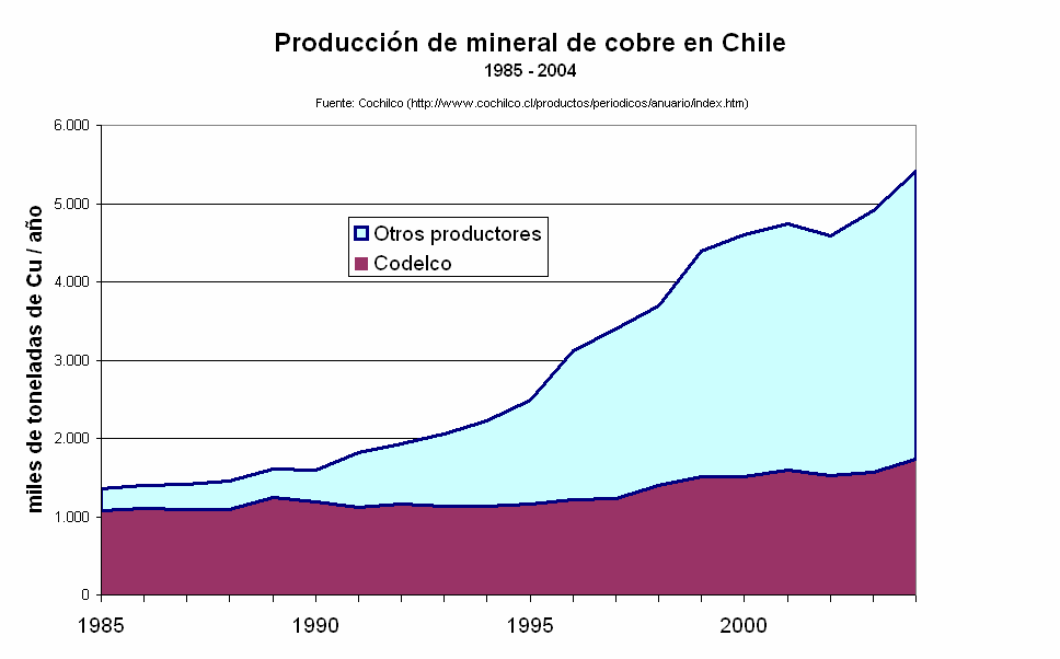 Producción de mineral de cobre en Chile de 1985 a 2004.